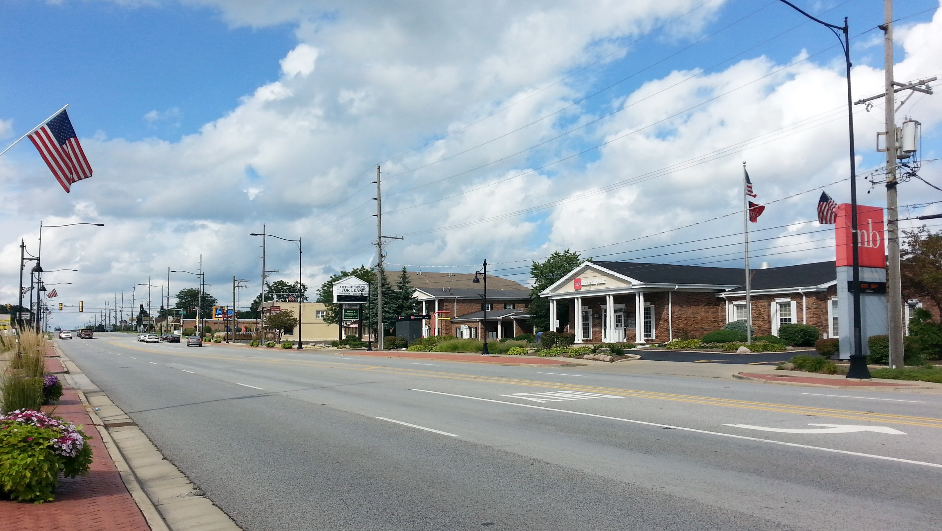 Cicero Avenue in Oak Forest, Illinois